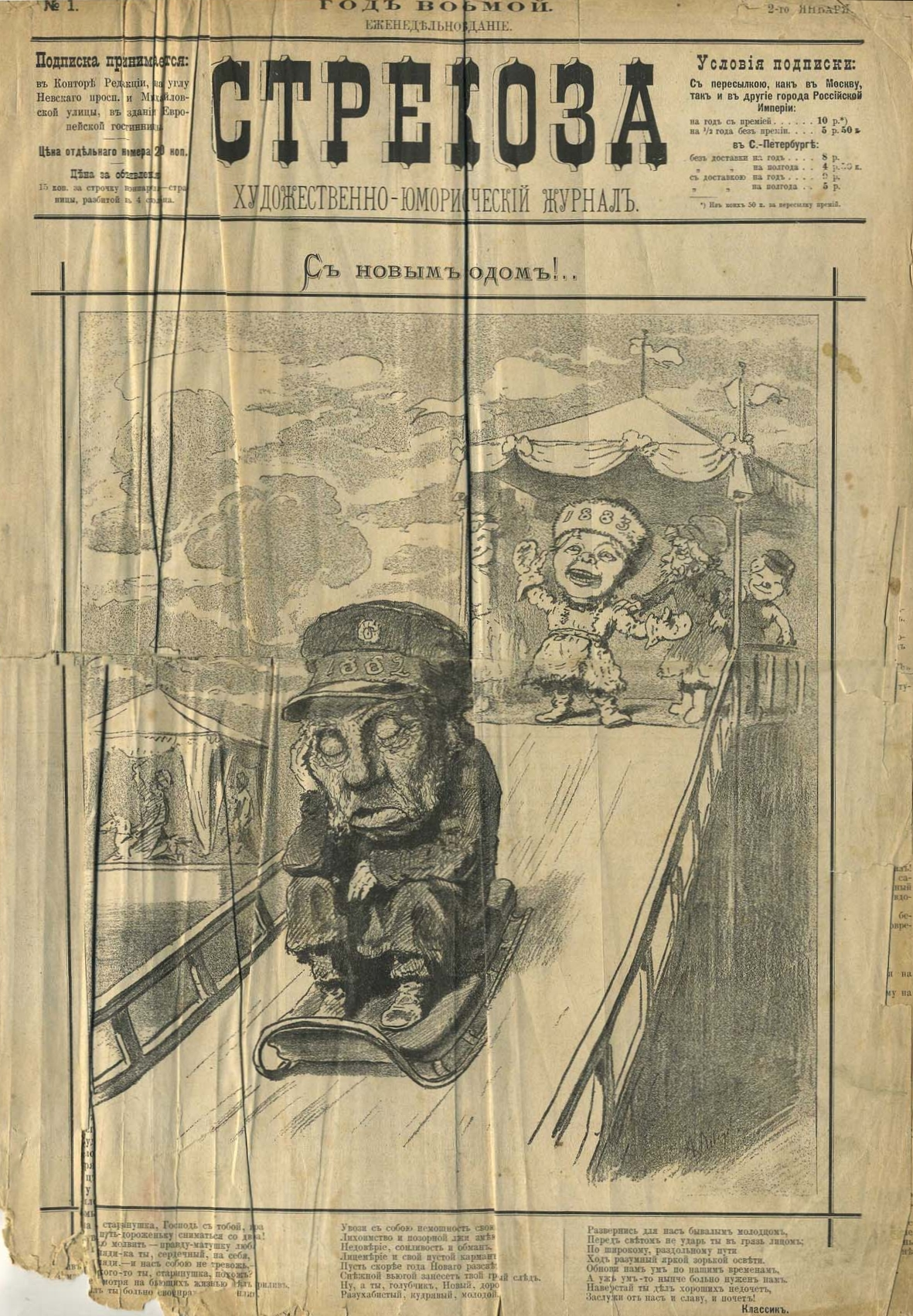 Журнал "Стрекоза" № 1 за 1883